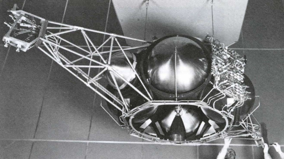 Module de propulsion de de la sonde spatiale Galileo